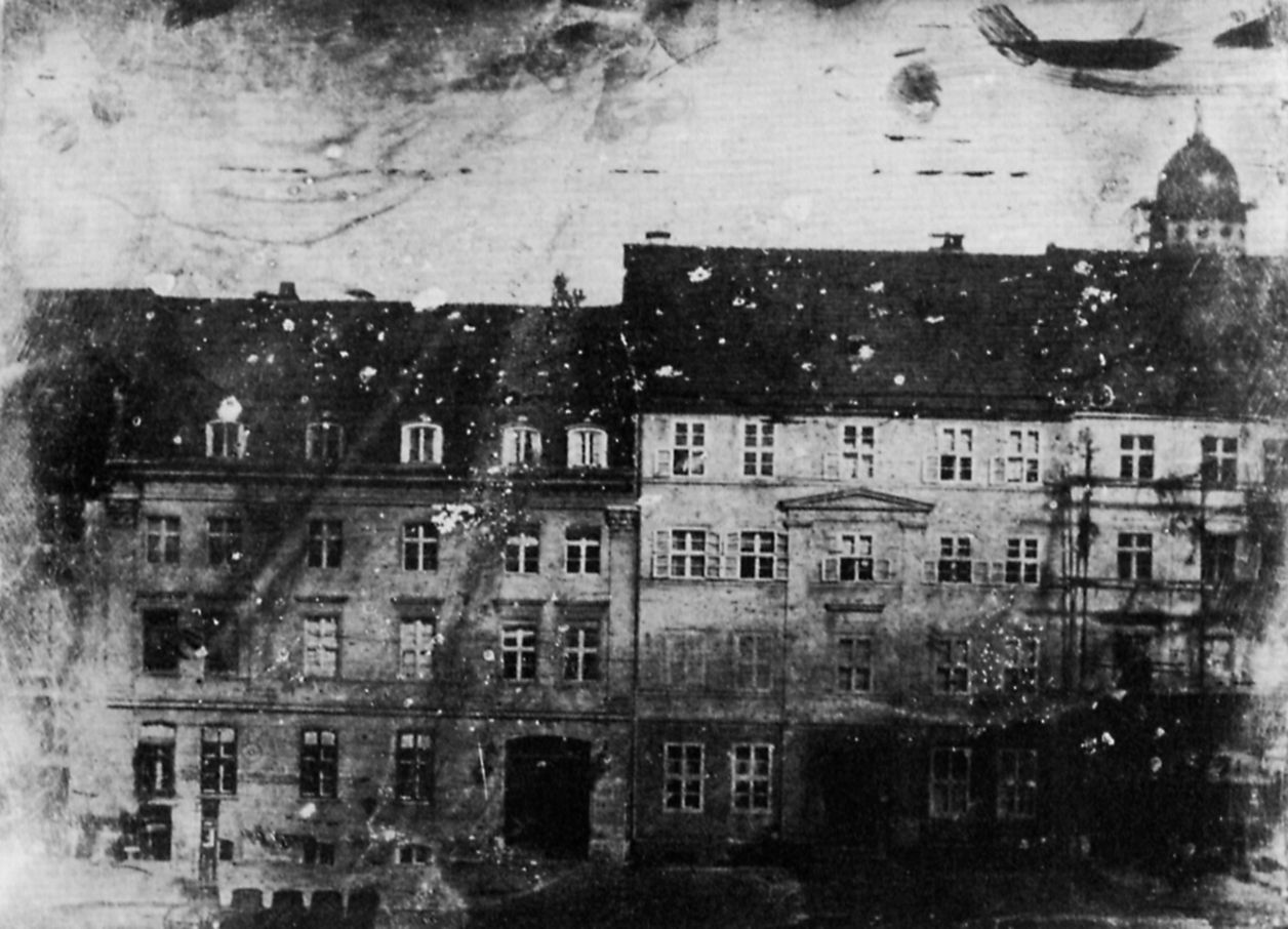 Hausvogteiplatz Nr. 5, 6 und 7